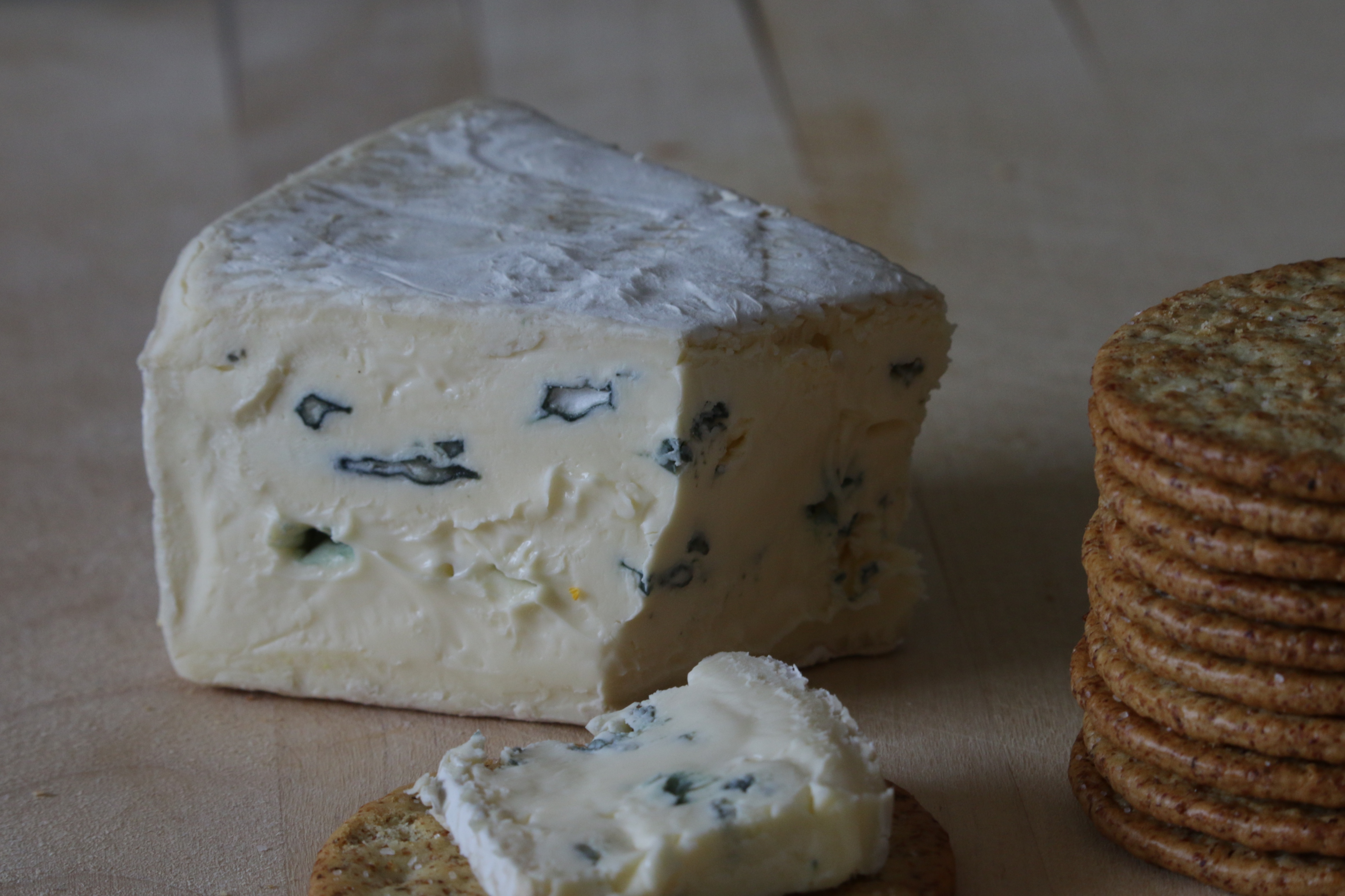 Cambozola och kex